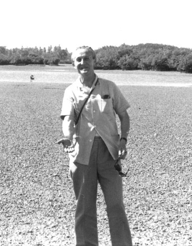 Raymond Mauny, historien et archéologue français, près de Joal (Sénégal)